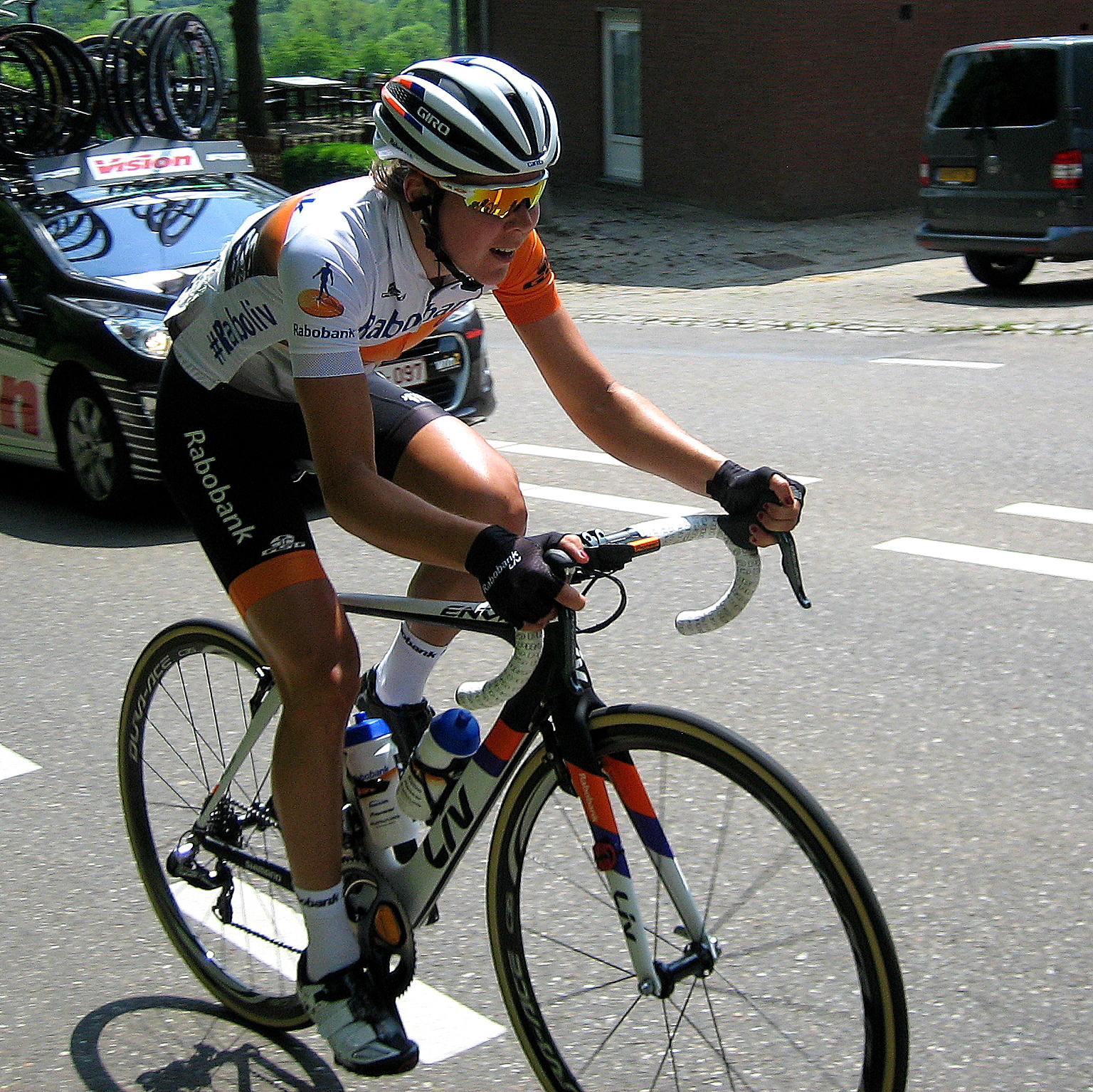 Thalita de Jong (Rabo-Liv) op kop in Holland Hills Classic 2016